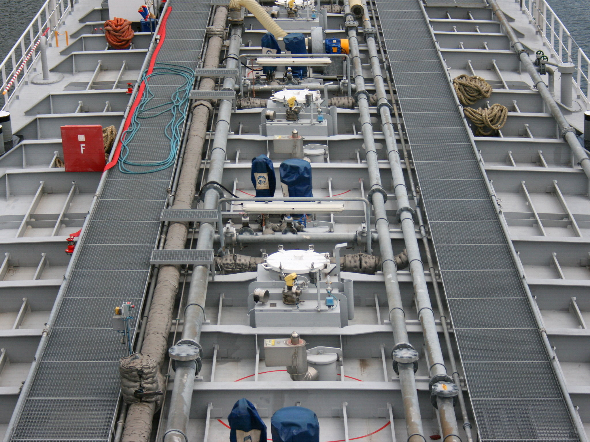 "Xylodrepa" auf dem Rhein-Herne-Kanal im Nordsternpark in Gelsenkirchen